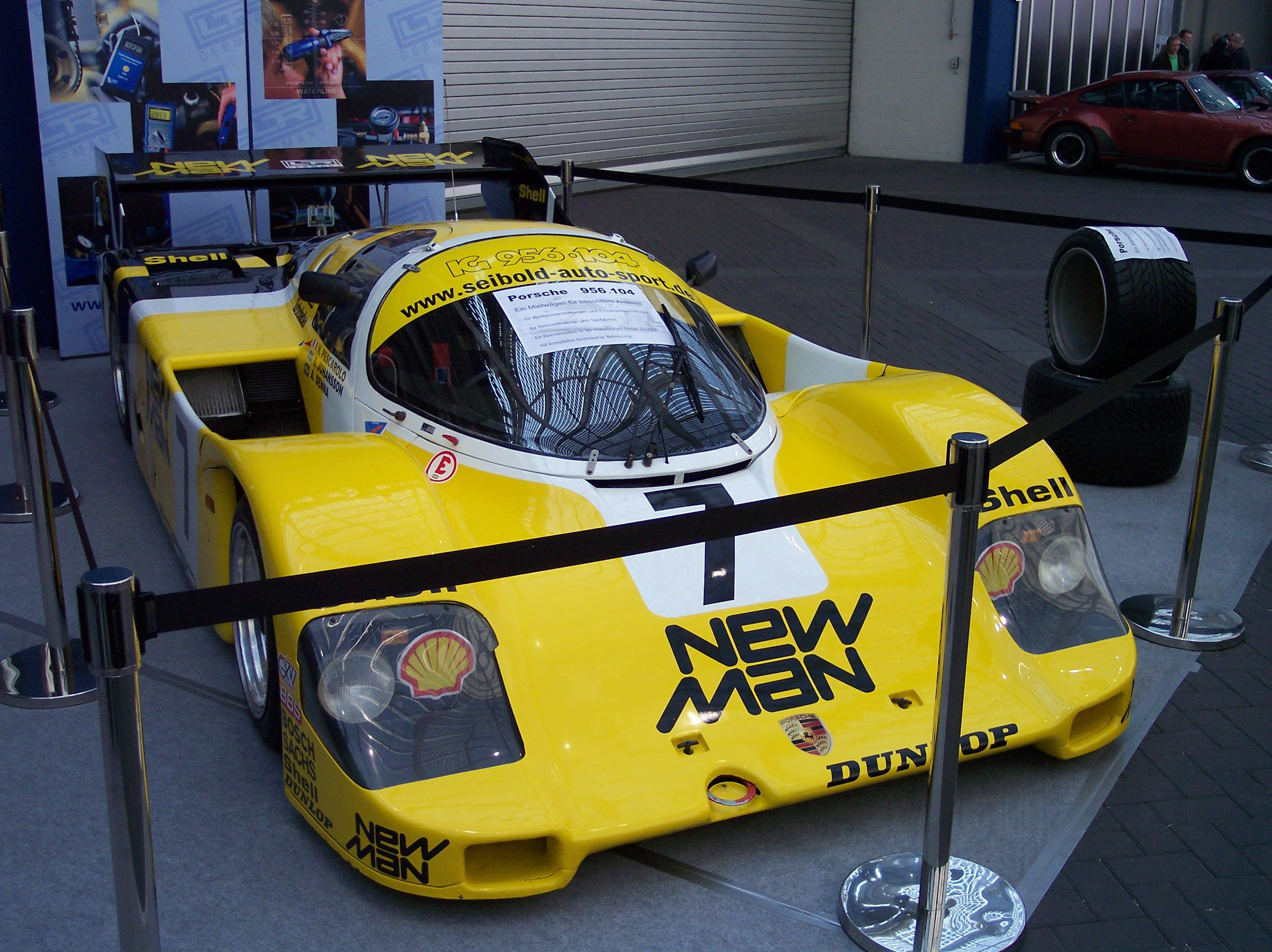 Porsche 956-104 (1984 1000km Nürburgring)